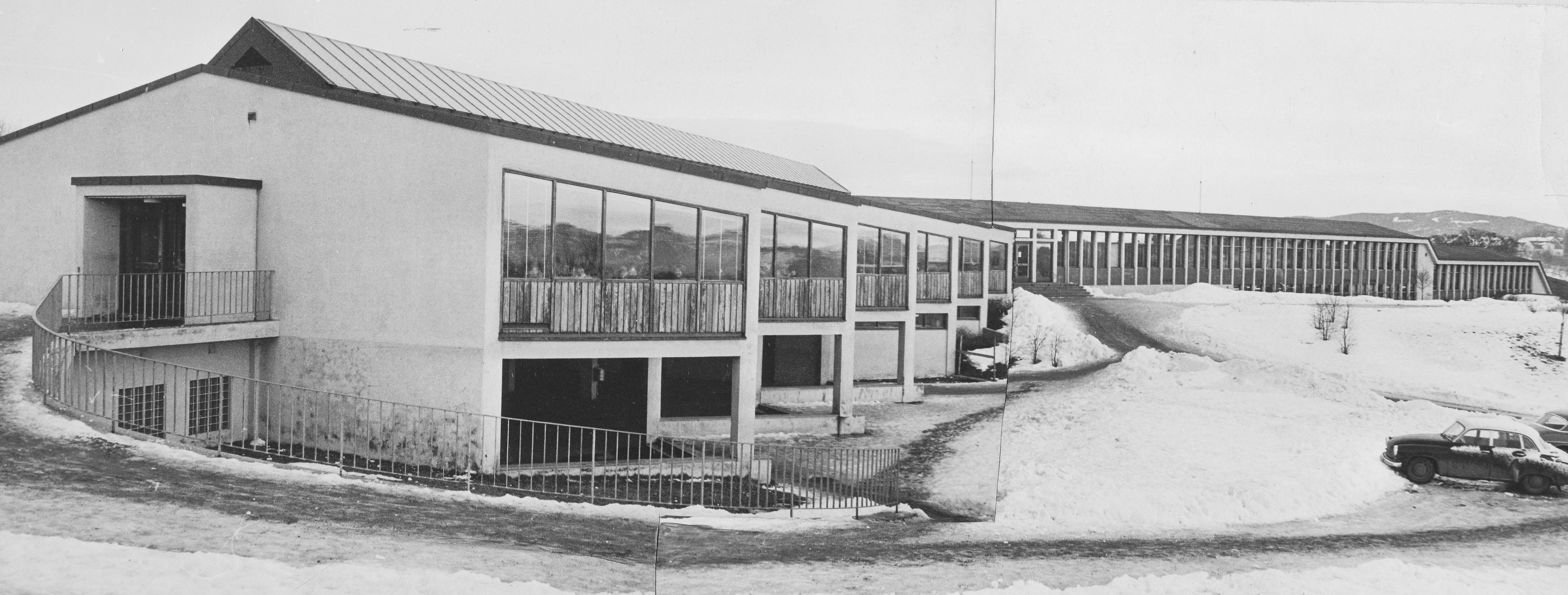 Ringve videregående skole fotografert i 1964.